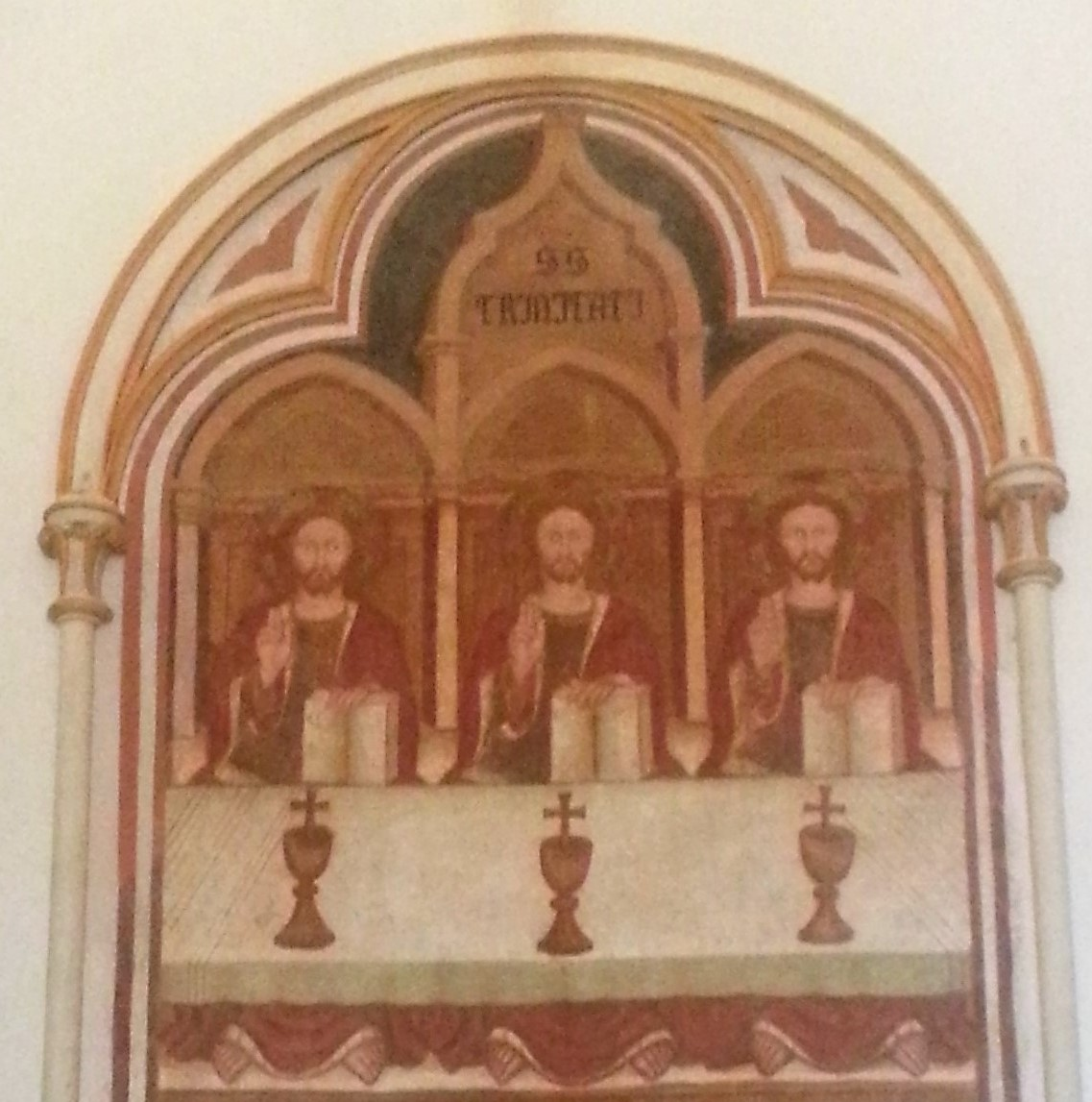 Particolare dell'affresco del Santuario della Ss Trinità nella frazione di Fiobbio di Albino